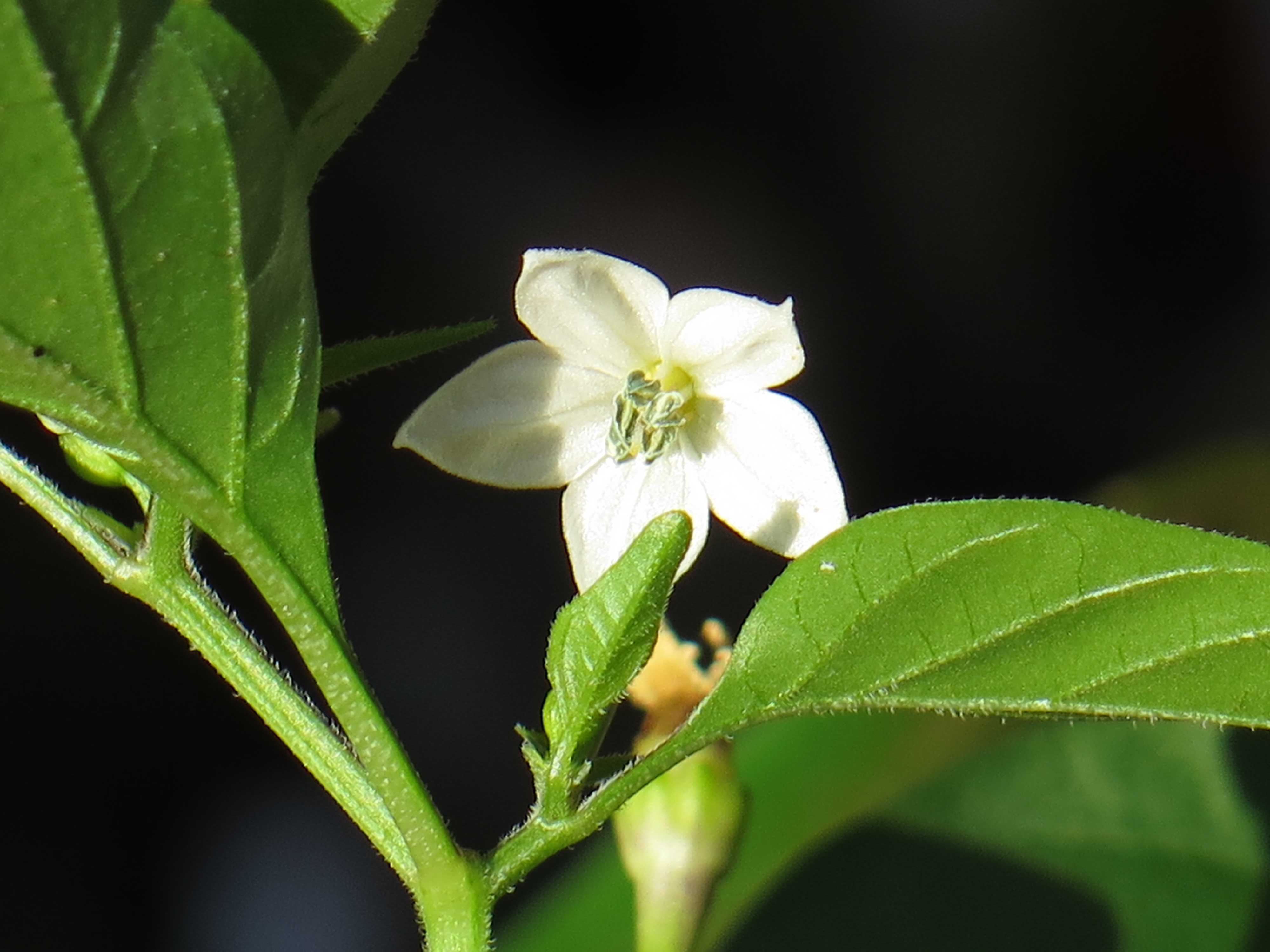 Il fiore del capsicum